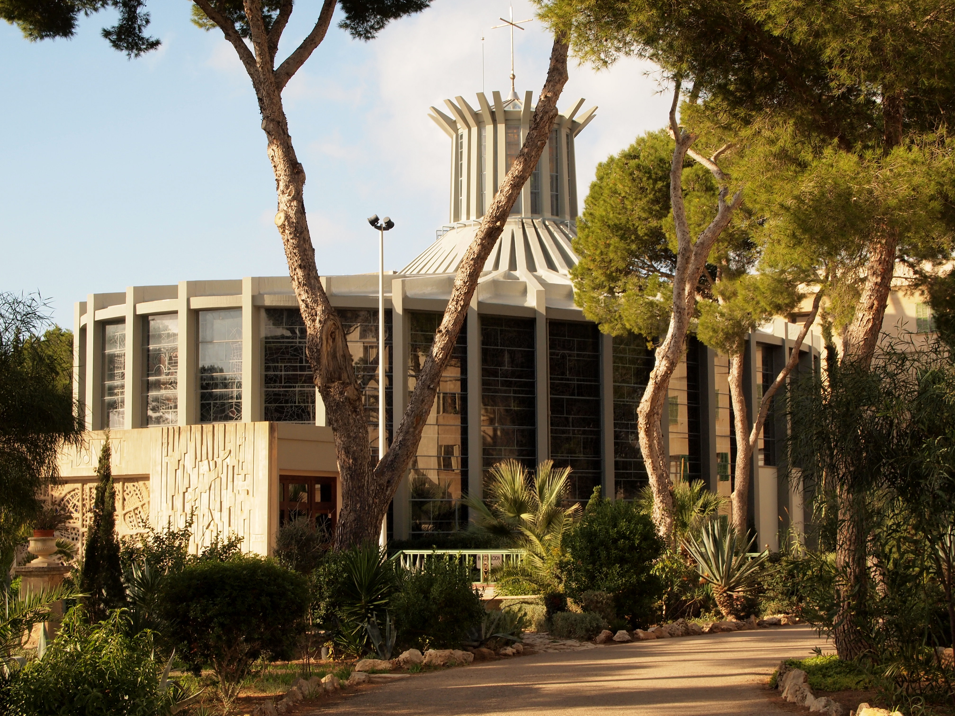 Església de Nostra Senyora dels Àngels de la Porciúncula, Palma (Mallorca). Exterior